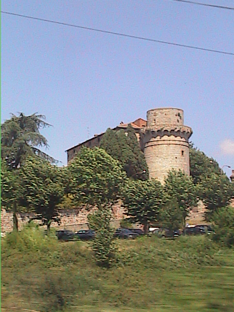 Il Torrione della Rocca di Trequanda, in provincia di Siena.